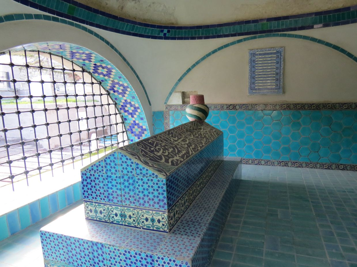 Sunullah Gaybi Türbesi